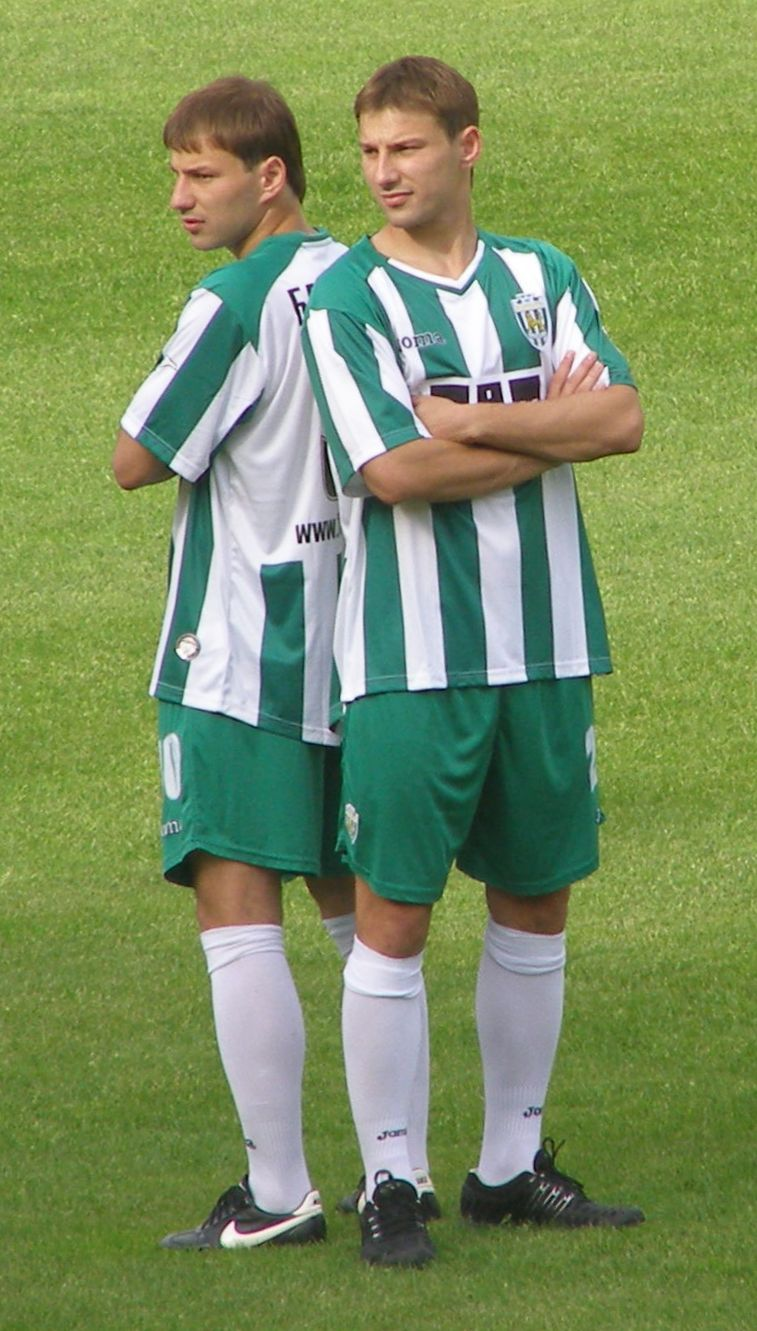 Die Baranez Brüder während der Karpaty-Team Präsentation vor der Saison 2010/11